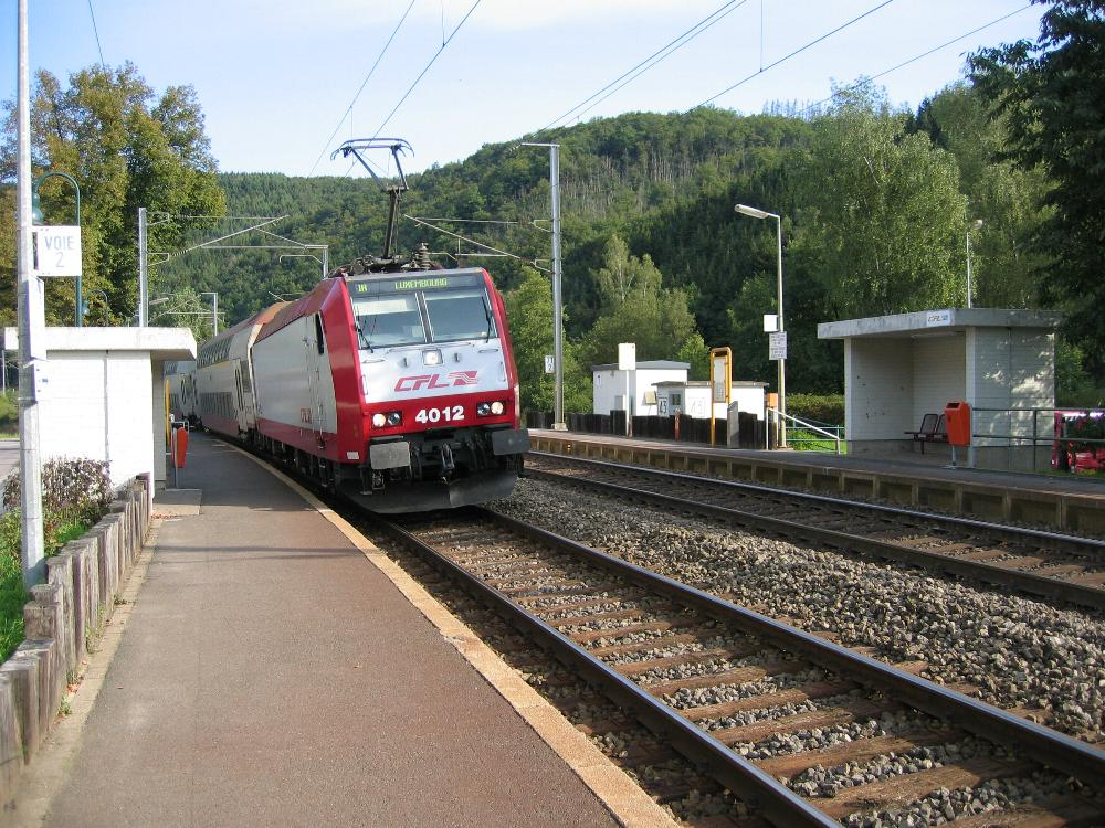 Den Eisebunnshalt zu Draufelt. Foto vum Pear 17:23, 11 September 2006 (UTC) 10.09.2006. Kategorie:CFL-Garen + Kategorie:Gemeng Munzen